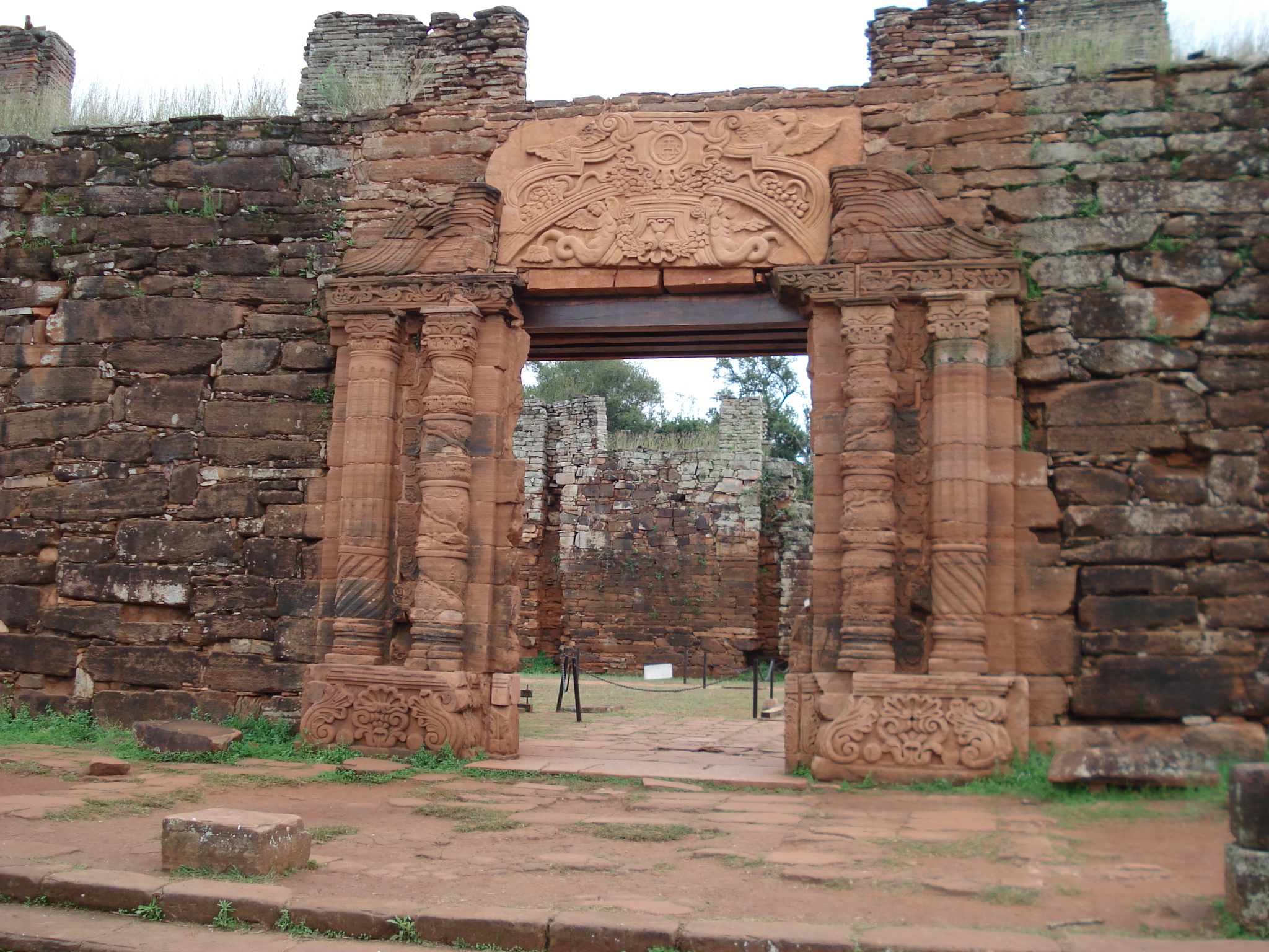 Una de las tantas imágenes que se pueden ver en las ruinas de San Ignacio en la provincia de Misiones, Republica Argentina.